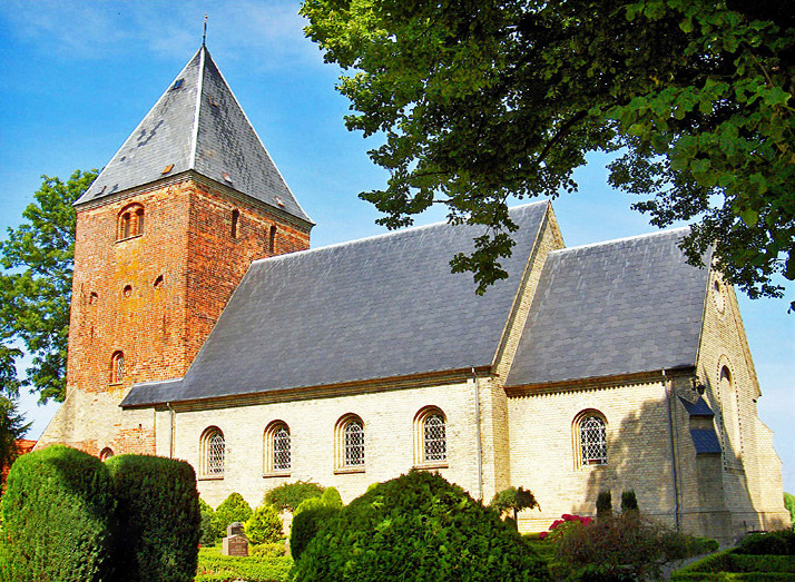 fra sydøst